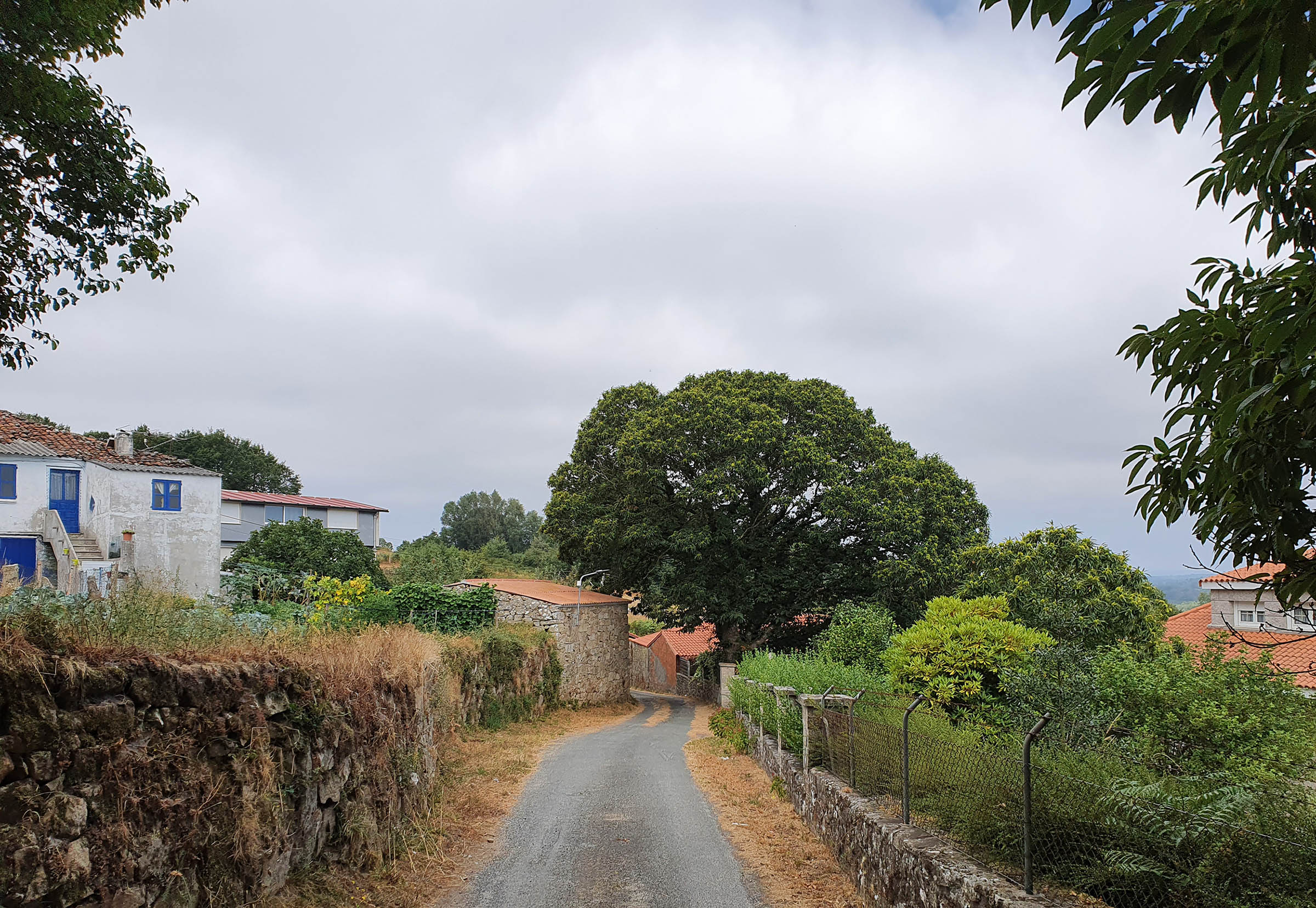 Lugar da Cualleira, na parroquia de Dorra en Antas de Ulla (Lugo)